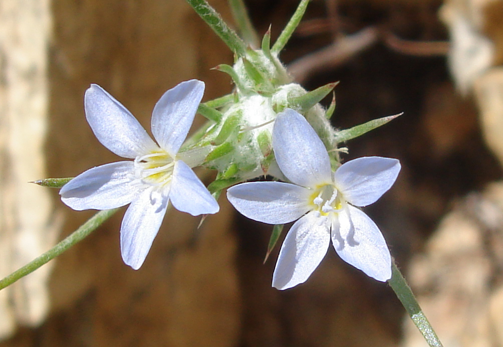 Eriastrum diffusum at Saguaro National Park, Arizona, USA